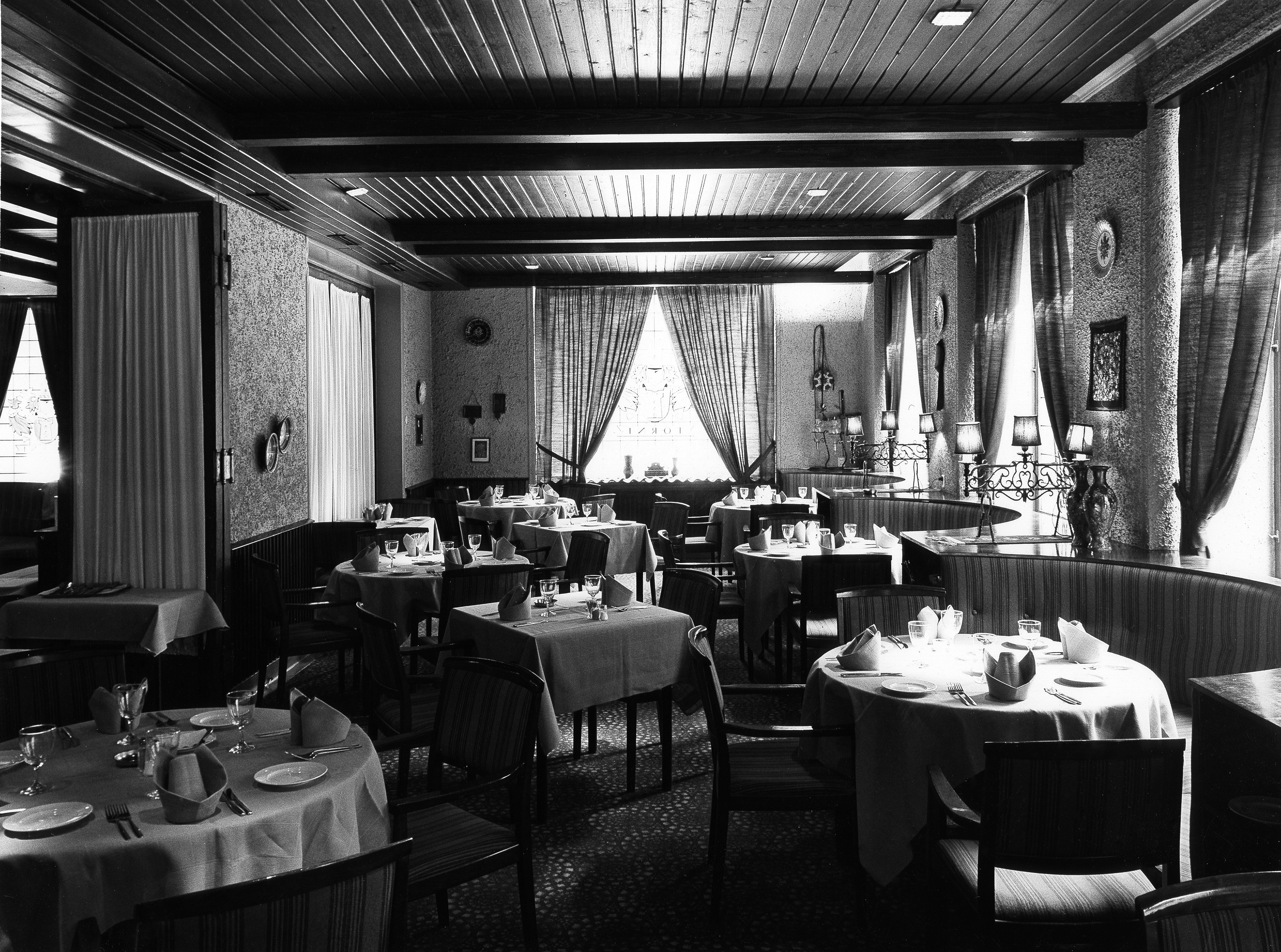 Hotelli Tornin balkanilainen ravintola vuonna 1979